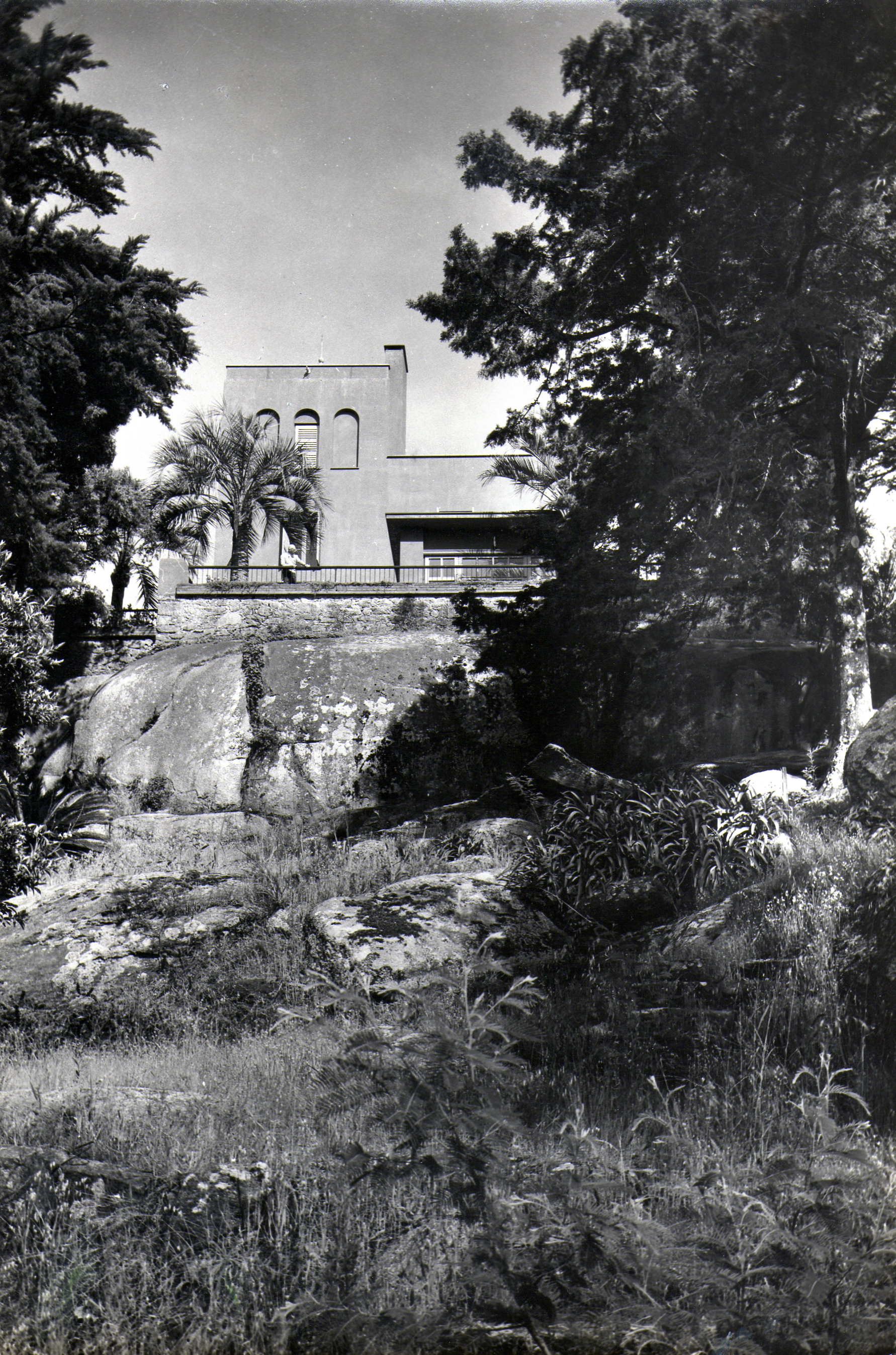 Residencia de Rafael de la Fuente Viera en Maldonado, Uruguay.